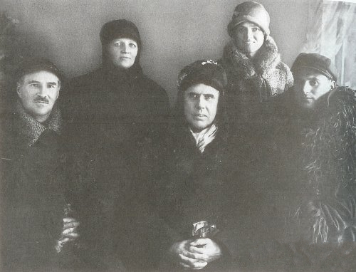 Теодор Драйзер и его спутники в Сталино, 19 декабря 1927 года. Слева направо: Летиен, зав. сельхоз. сектором, др. Софья давидовская, Драйзер, Руфь Кеннел, местный гид)